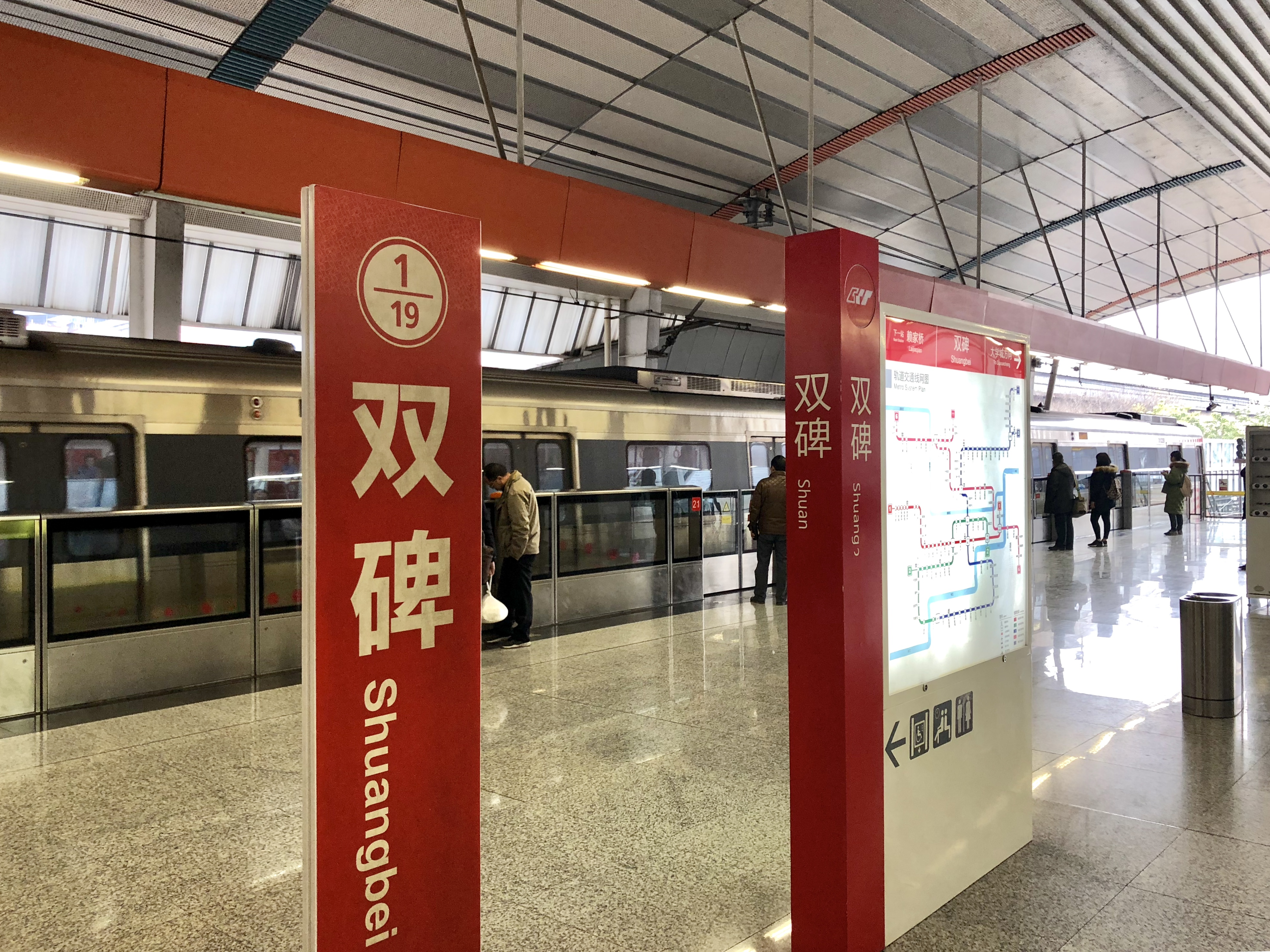 中文（中国大陆）: 1 号线双碑站